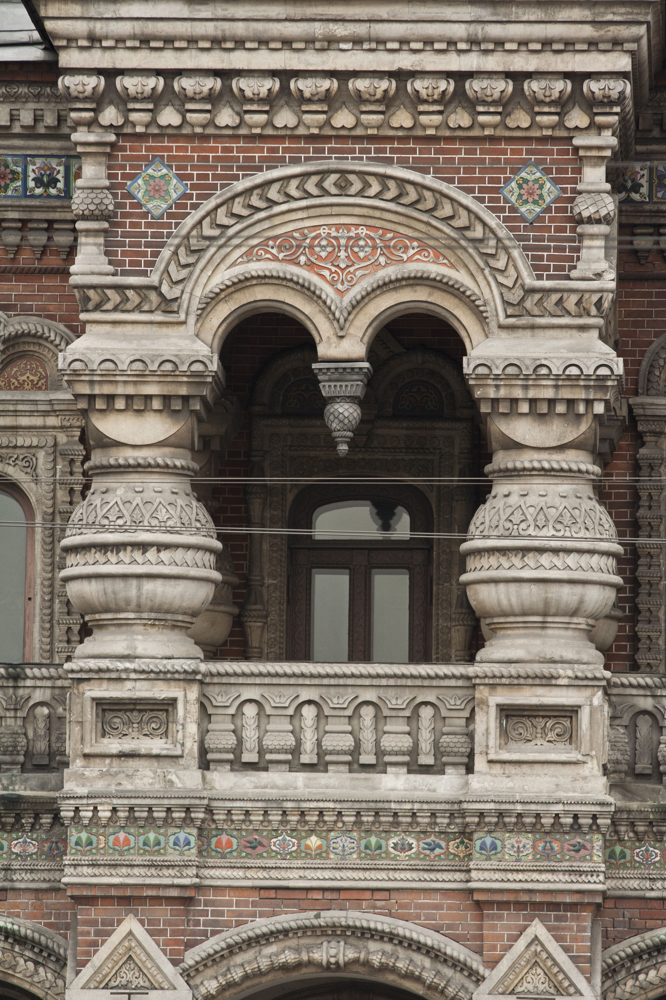 Дом Игумнова (1889-1893) - Посольство Франции